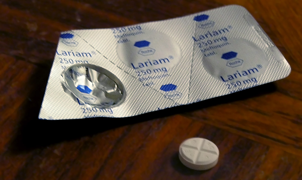 Lariam pills